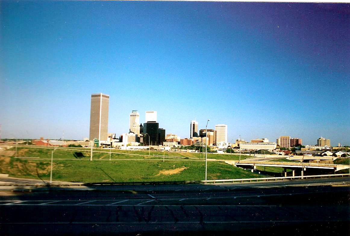 Tulsa Oklahoma Downtown